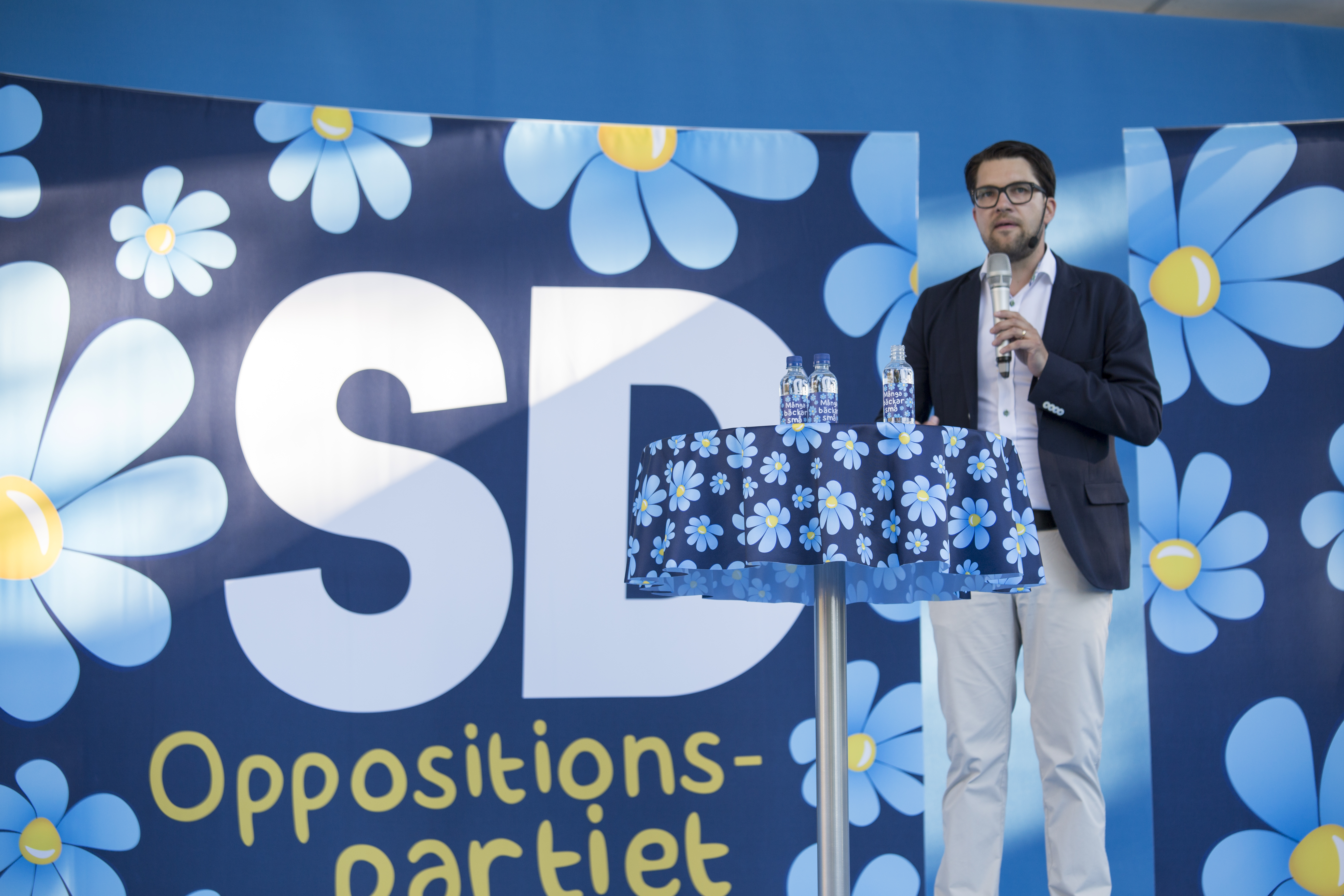 Jimmie Åkesson 8